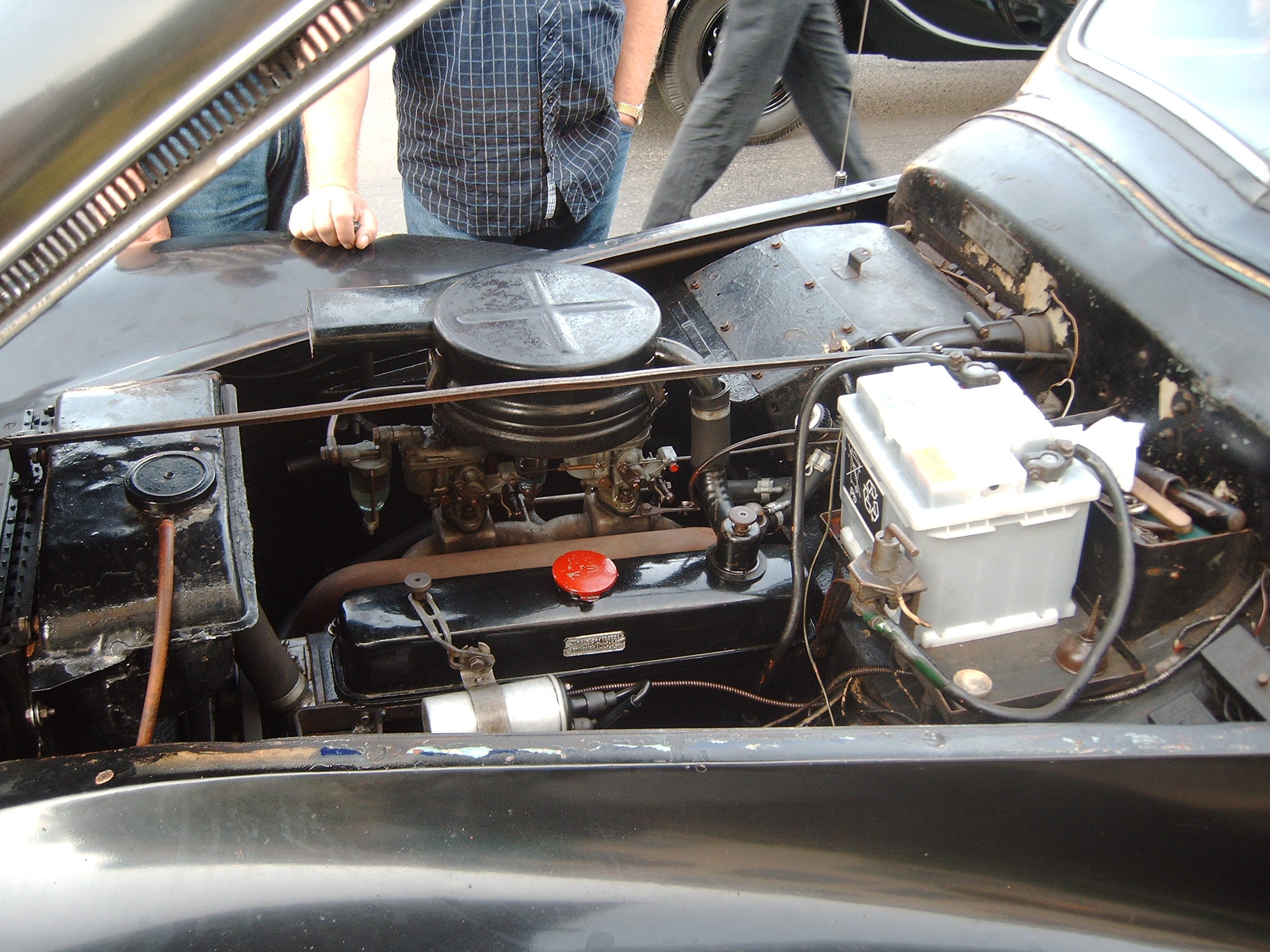 Eisenach, 04.09.2004 EMW 340 Motor